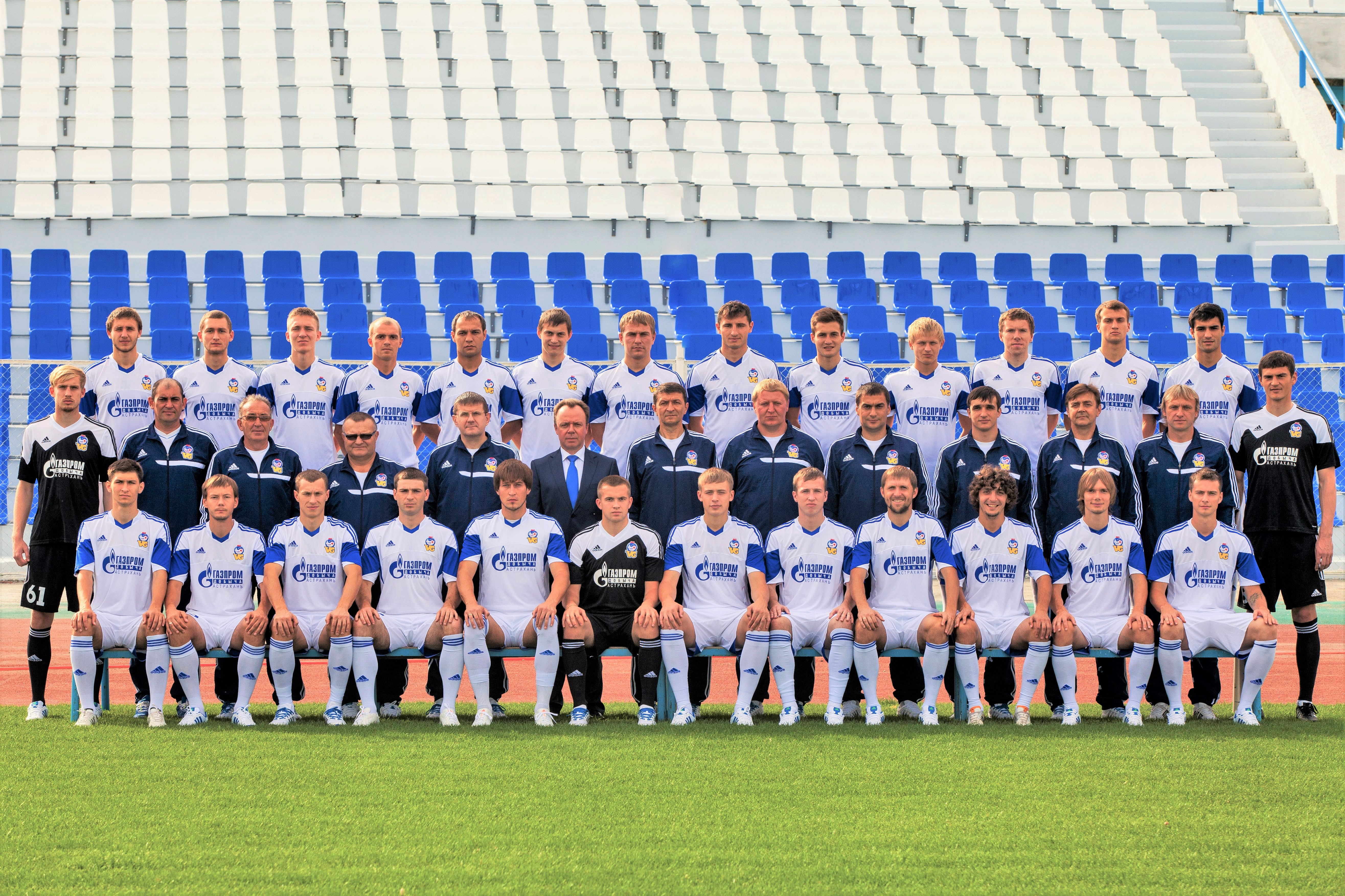 Состав фк Волгарь